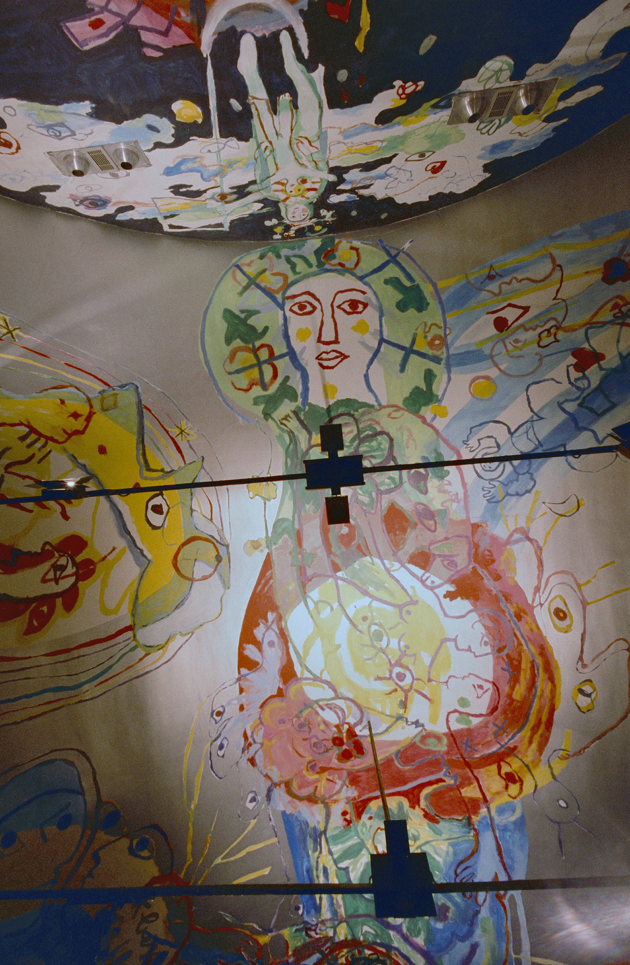 Catharinakapel: Interieur, kapel met moderne muurschilderingen (Hans Truijen, 1978), detail